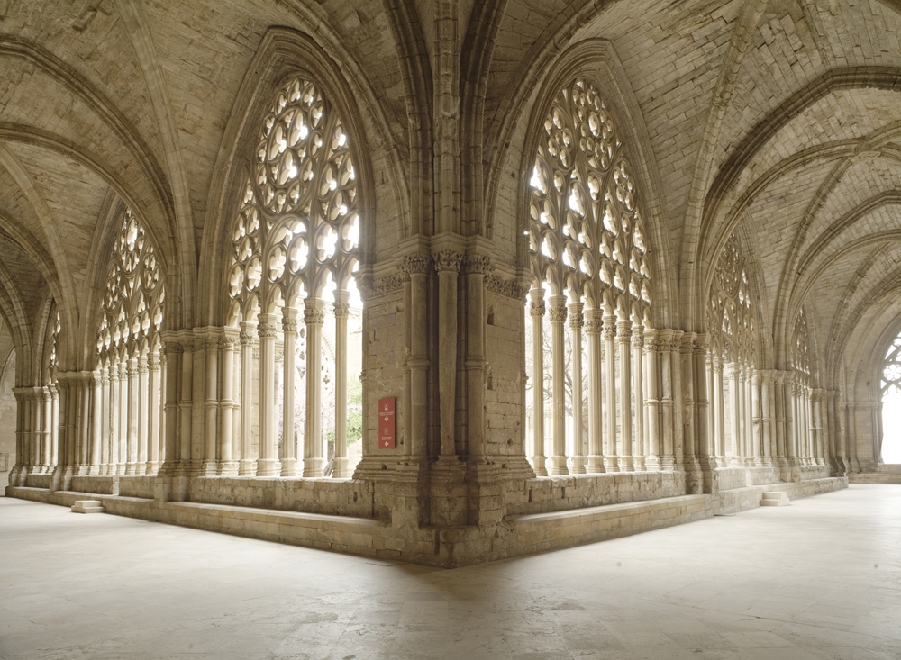 unidentified Spain